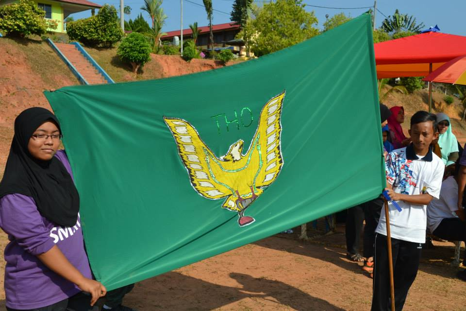 Rumah Hijau SMK Undang Jelebu